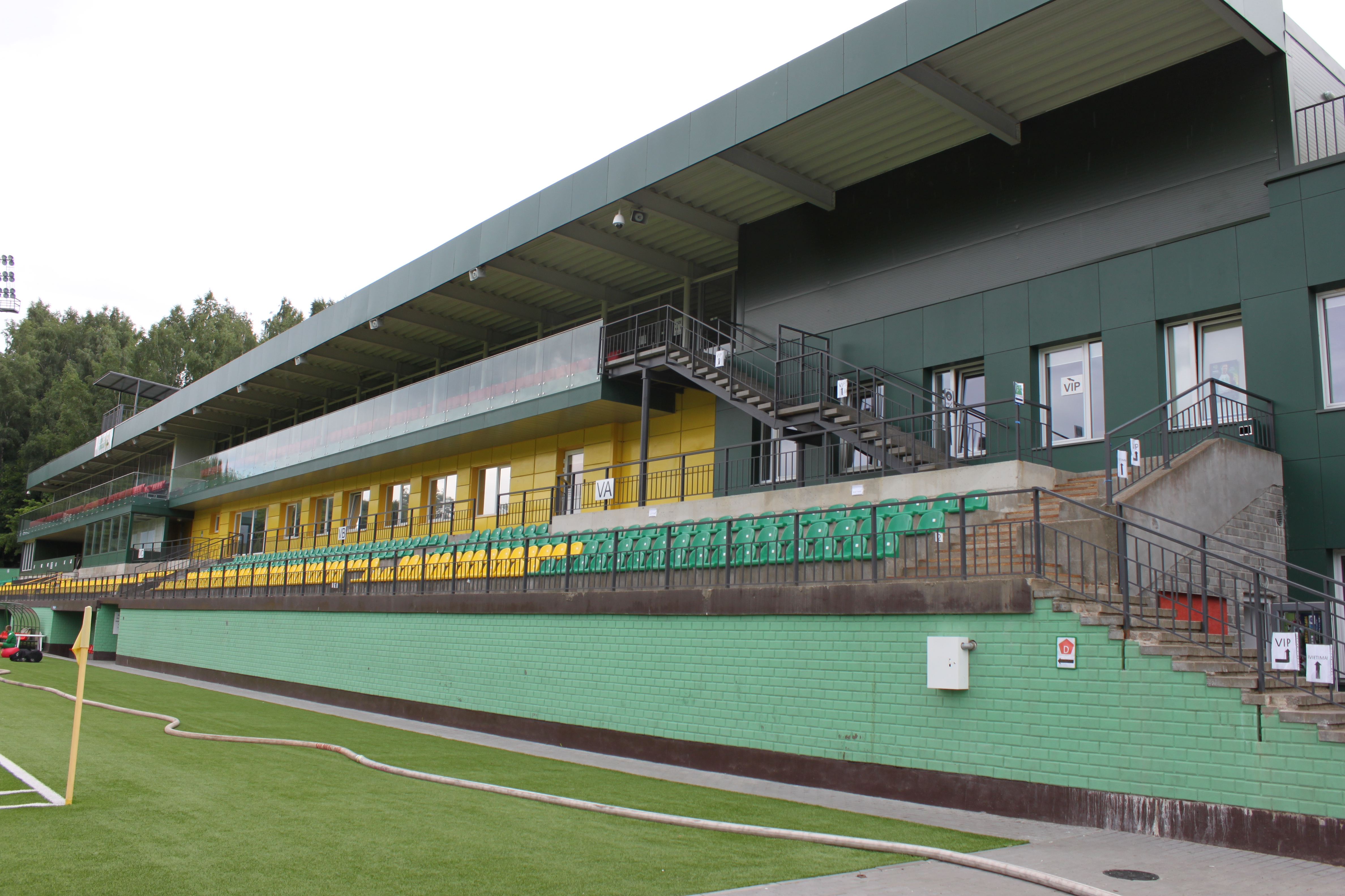 LFF stadiono VIP tribūna